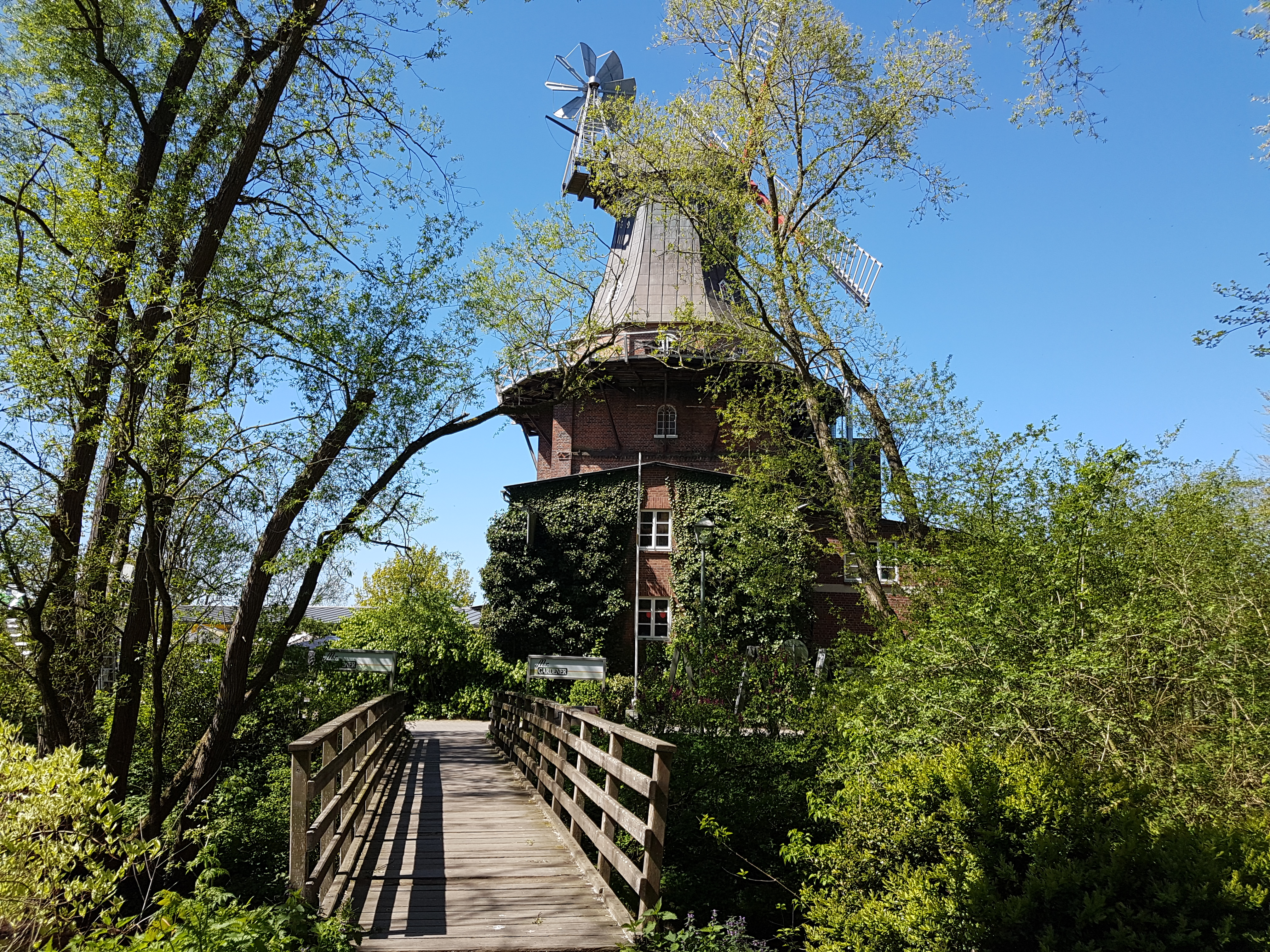 Alte Windmühle "Wehbers Mühle" in Himmelpforten von der Brücke des Mühlenbaches aus fotografiert